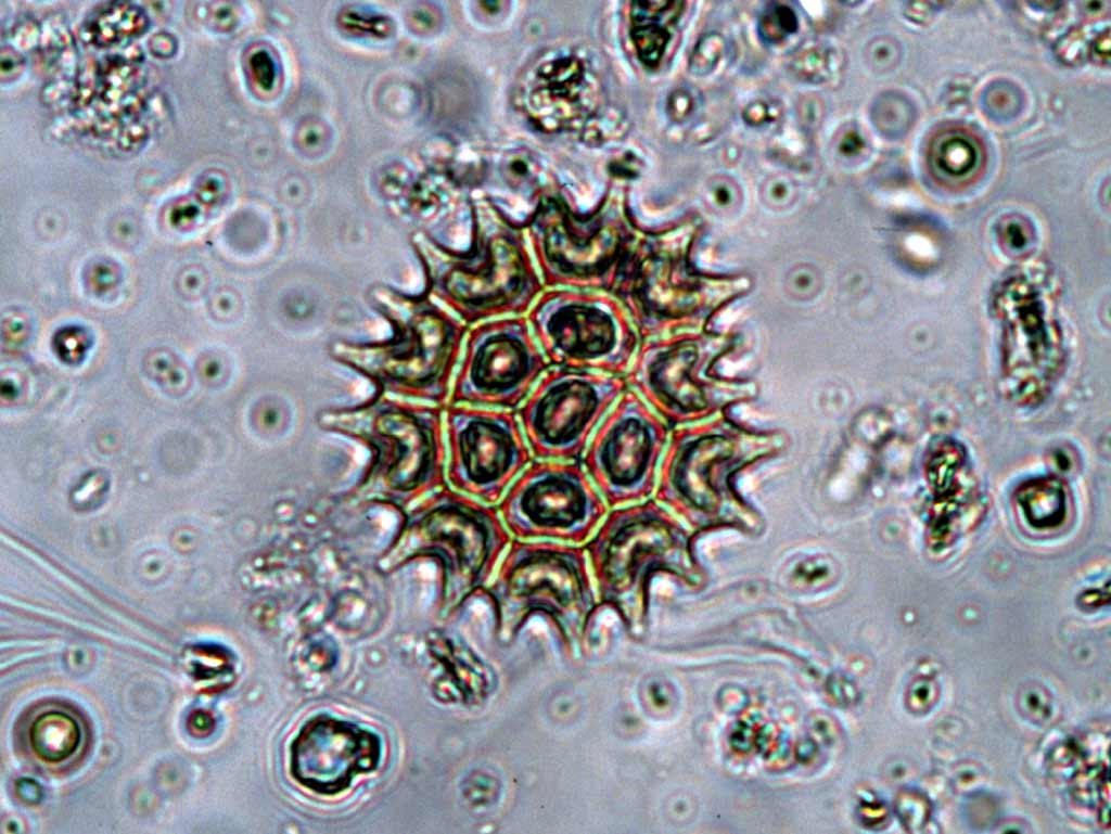 Pediastrum boryanum = Pseudopediastrum boryanum (Turpin) E.Hegewald